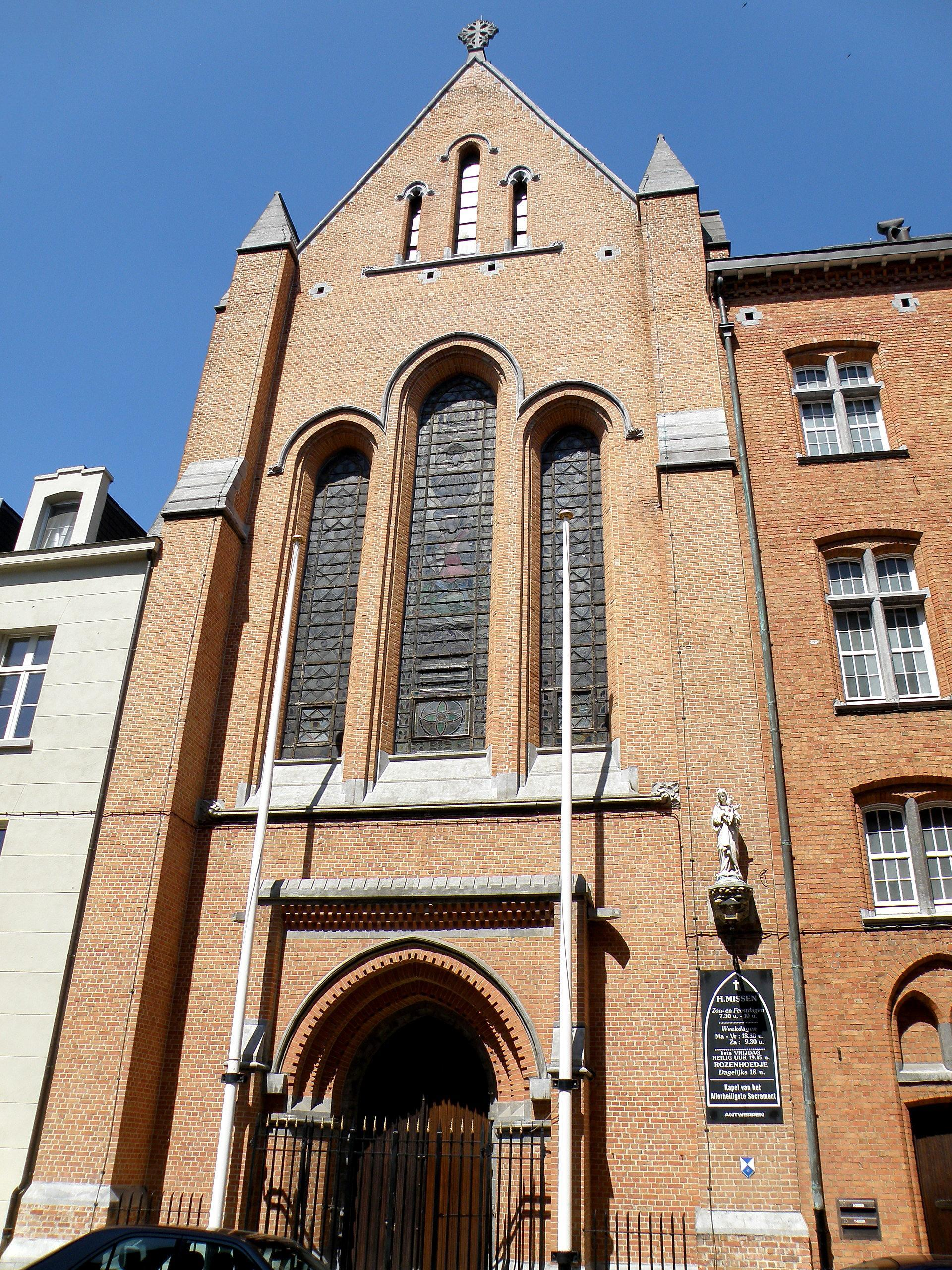 Chapelle néo-gothique du Très-Saint-Sacrement, avec couvent adjacent des Sœurs bénédictines de l'Adoration perpétuelle, sis aux n° 21 et 23 de la Hemelstraat à Anvers (Belgique). Édifiés entre 1890 et 1892, d'après les plans de l'arch. Ernest Stordiau. Façade de la chapelle sur la Hemelstraat.